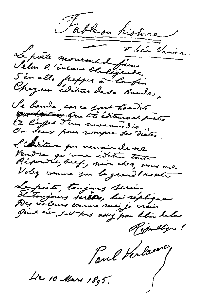 Manuscrit autographe de Fable ou histoire par Paul Verlaine (1844-1896). Daté du 10 mars 1895 et publié en 1896 dans le recueil Invectives, il a pour titre alternatif Anecdote (Léon Vanier, Œuvres complètes de Verlaine, vol. III, 1901).